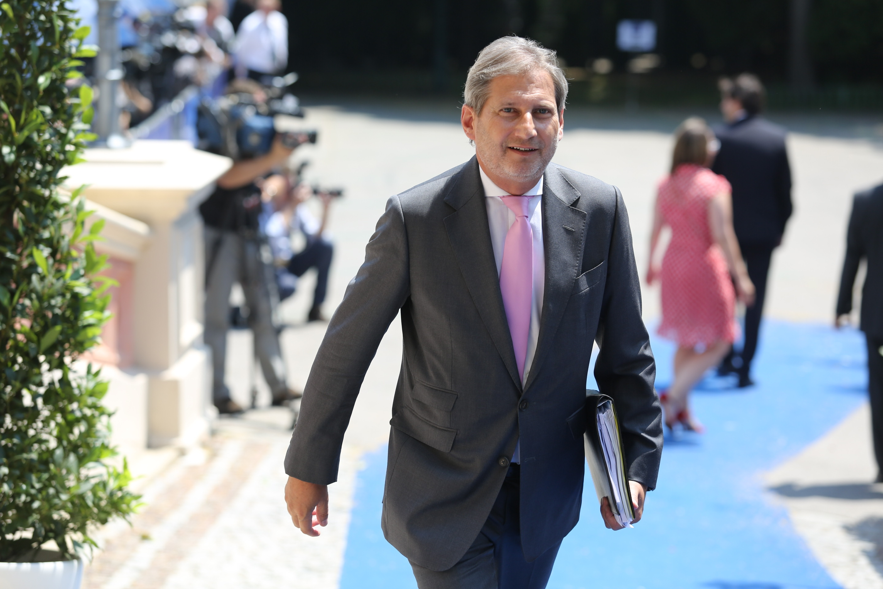 Fotograf: Jakob Glaser